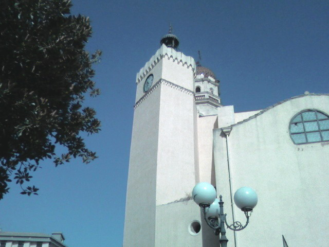 Torre Campanaria della Basilica di Sant'Elena scattata il 17 settembre 2007 con cellura Samsung SGH-Z230 e ritoccata (cambiata la luminosità) con ACDSee8